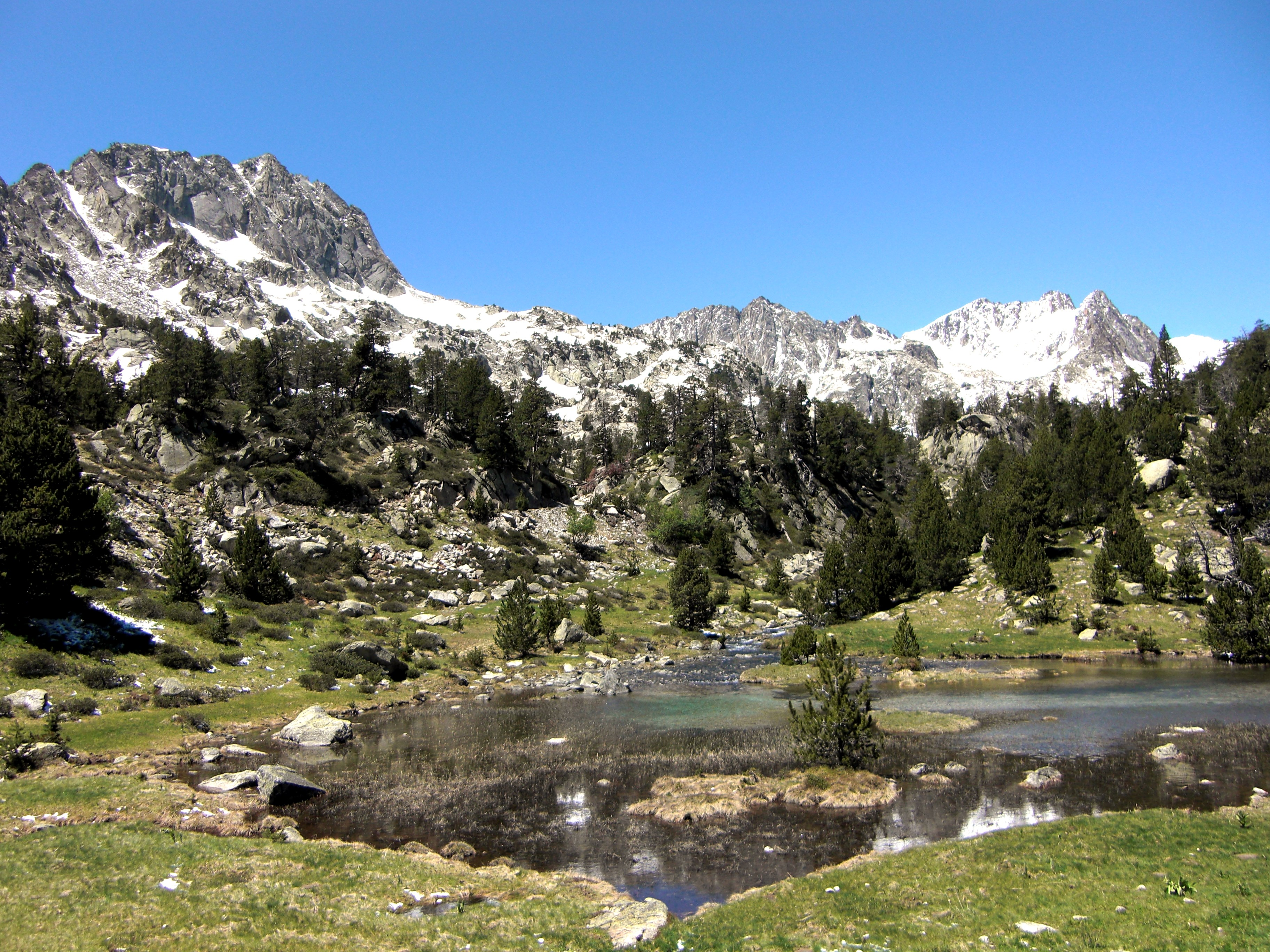 Estanyola de Ratera This is a a photo of a natural area in Catalonia, Spain, with id: ES510081